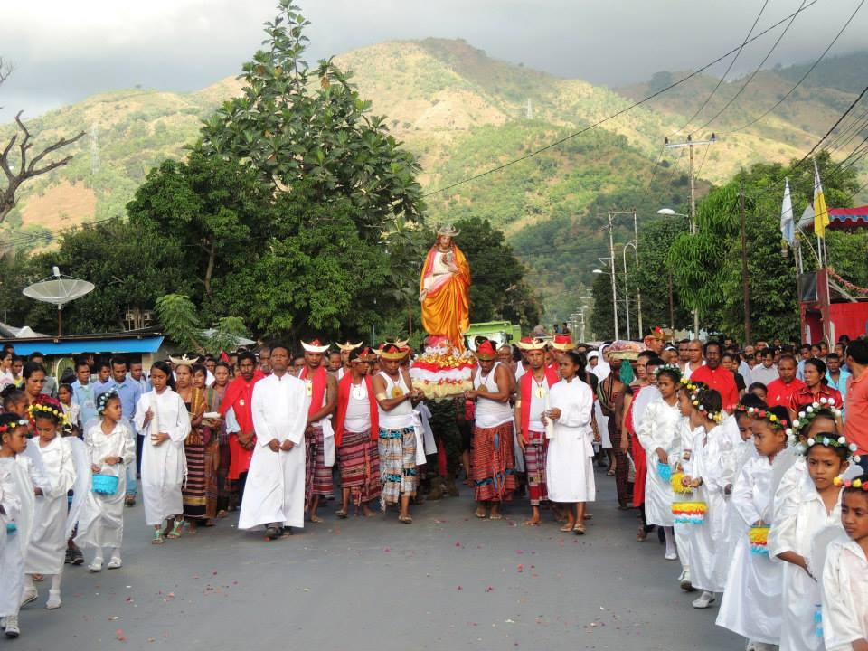 Prozession zum 50jährigen Jubiläum der Pfarrei Becora